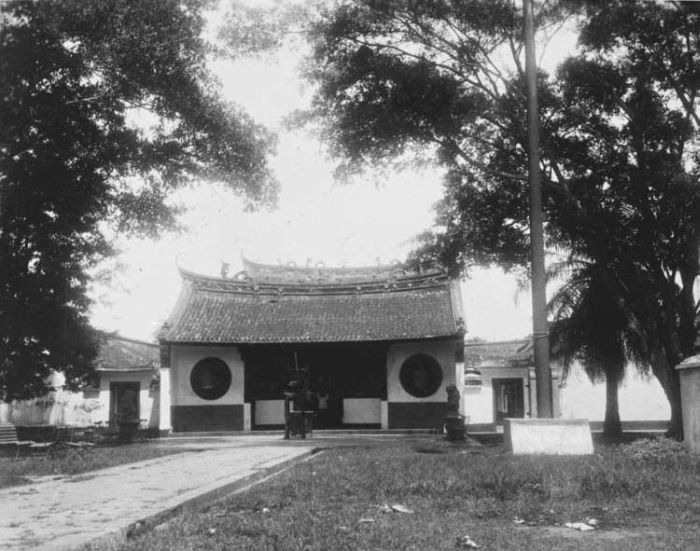 Foto. De Jin De Yuan tempel in Batavia